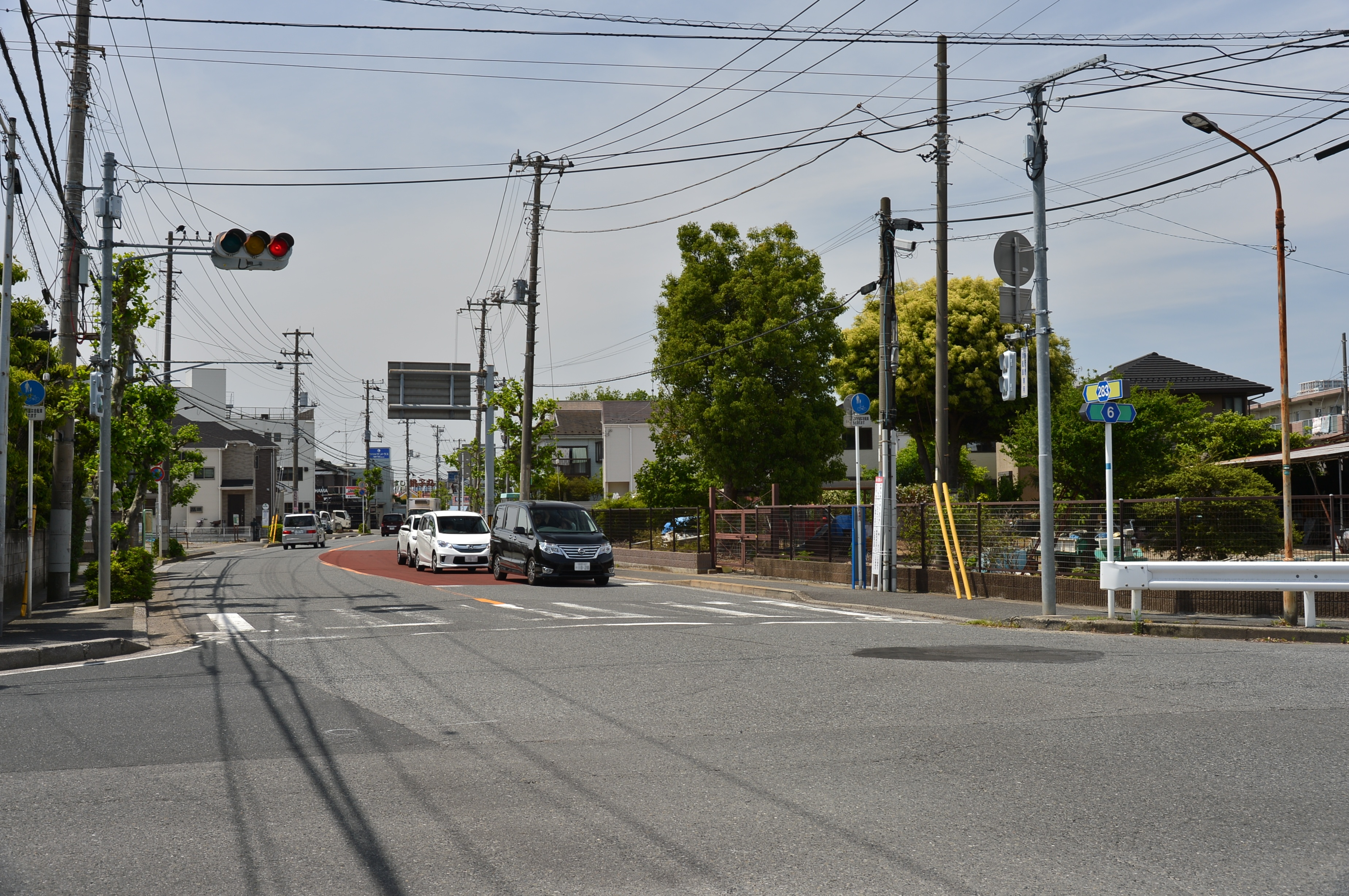 千葉県道283号若宮西船市川線（市川市稲荷木1丁目）